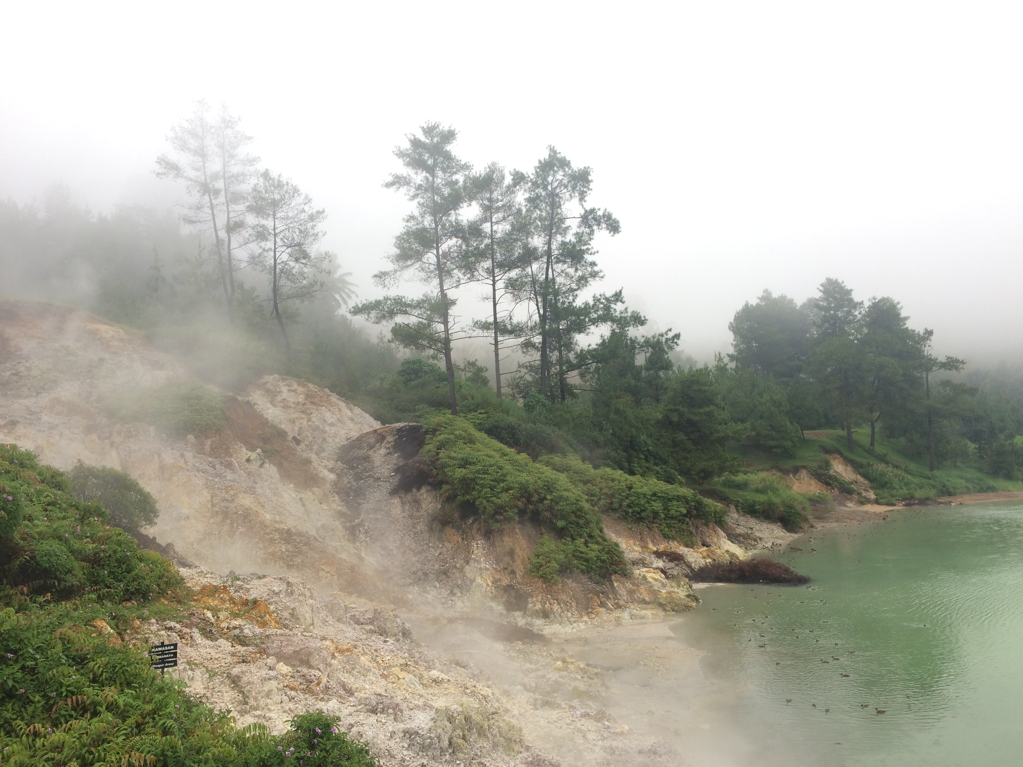 Danau Linow di Sulawesi Utara.